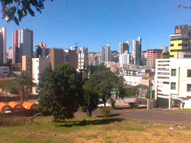 Pato Branco 2013